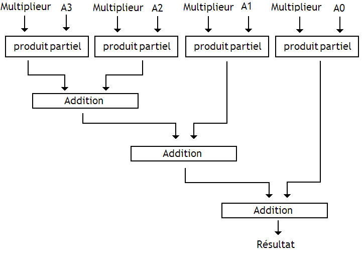 Array multiplieur